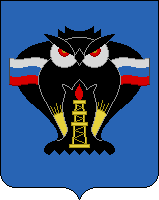 Герб города Новый Уренгой (ЯНАО), 1995 год.